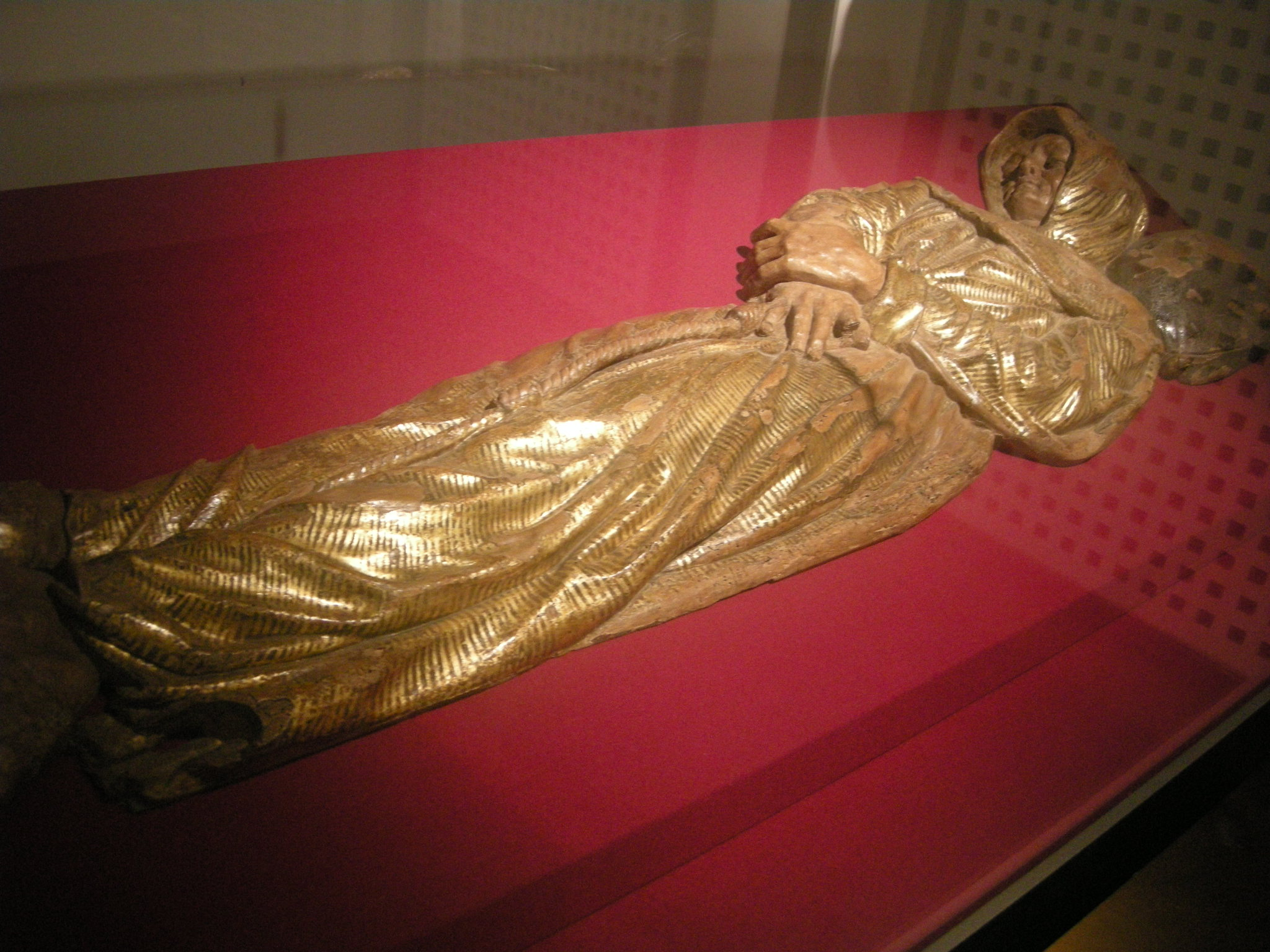 Antonio Federighi, San Bernardino da Siena, esposto nel Museo civico medievale a Bologna; numero d'inventario: 2822.